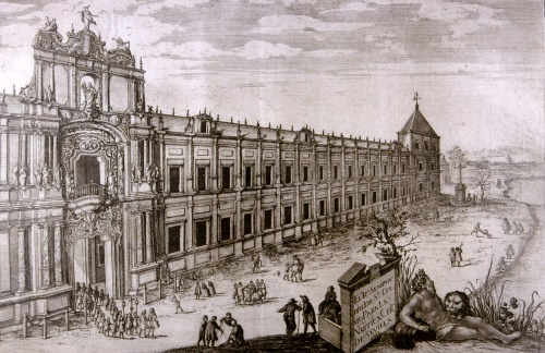 Fachada delantera del palacio de San Telmo.